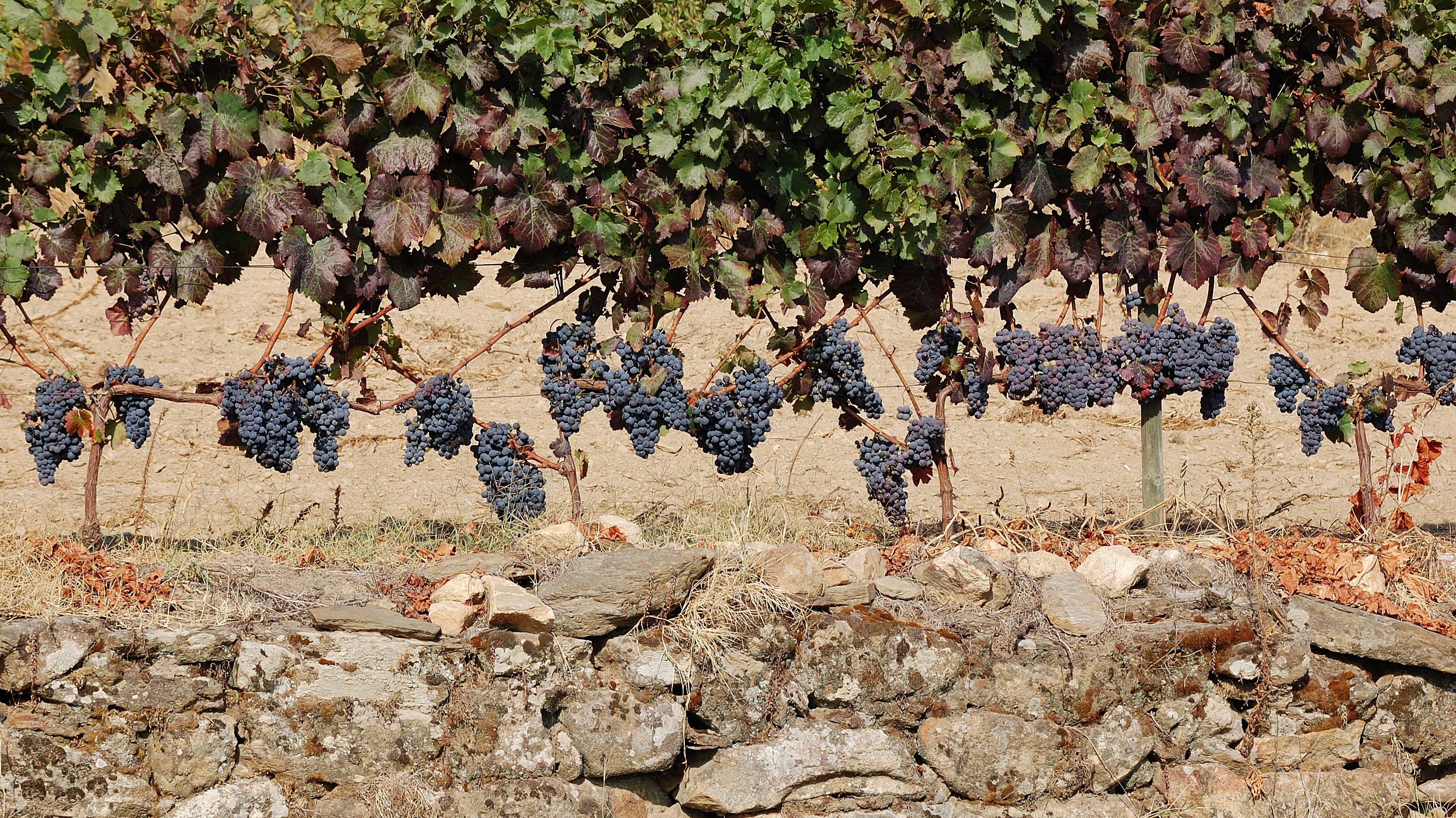 From author: "Douro, Portugal [2010]" Taken in Carrazeda de Ansiaes, Bragança